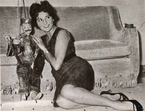 Italian actress Francesca Benedetti